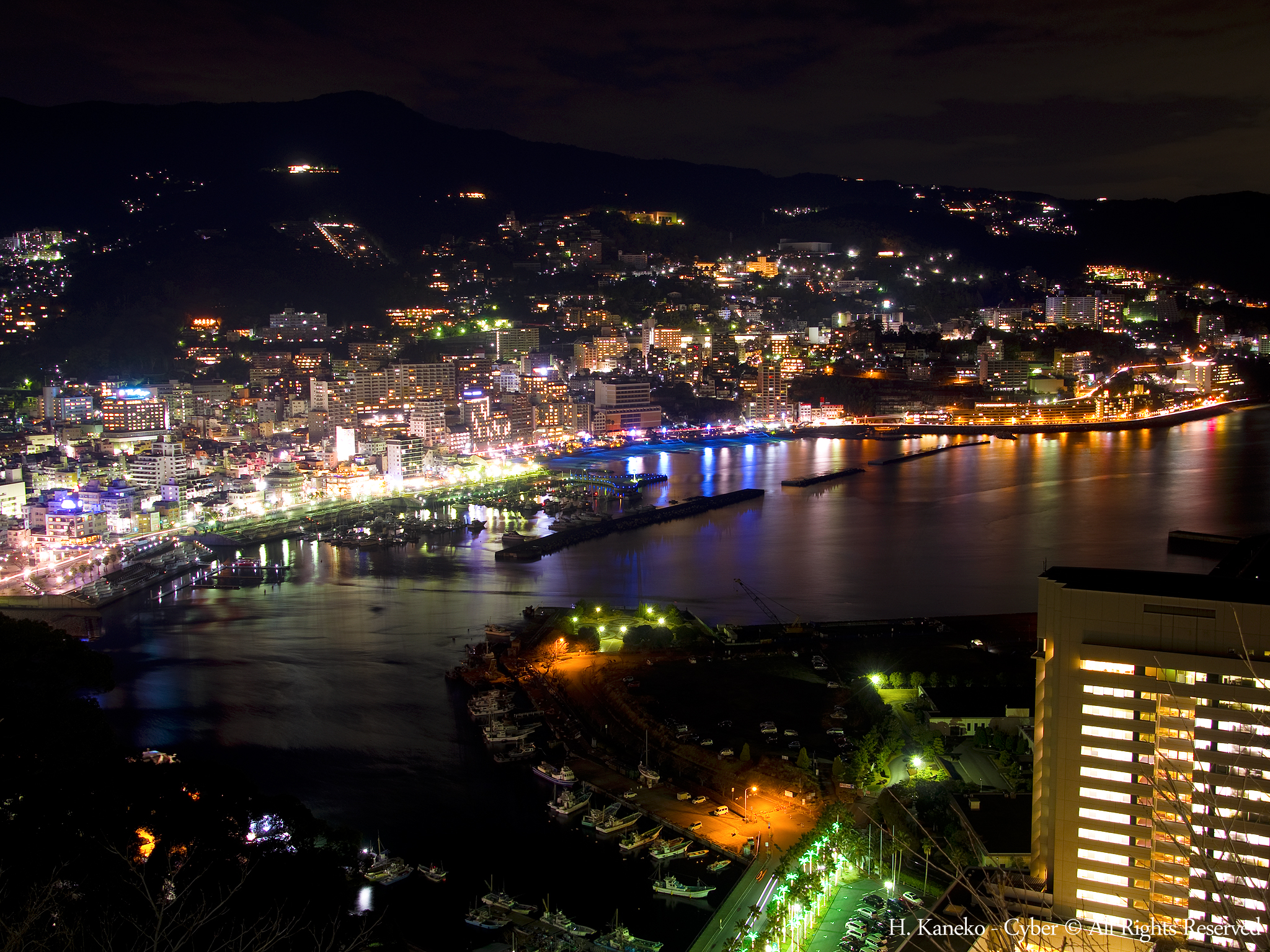 熱海市の夜景。Panoramioより転載